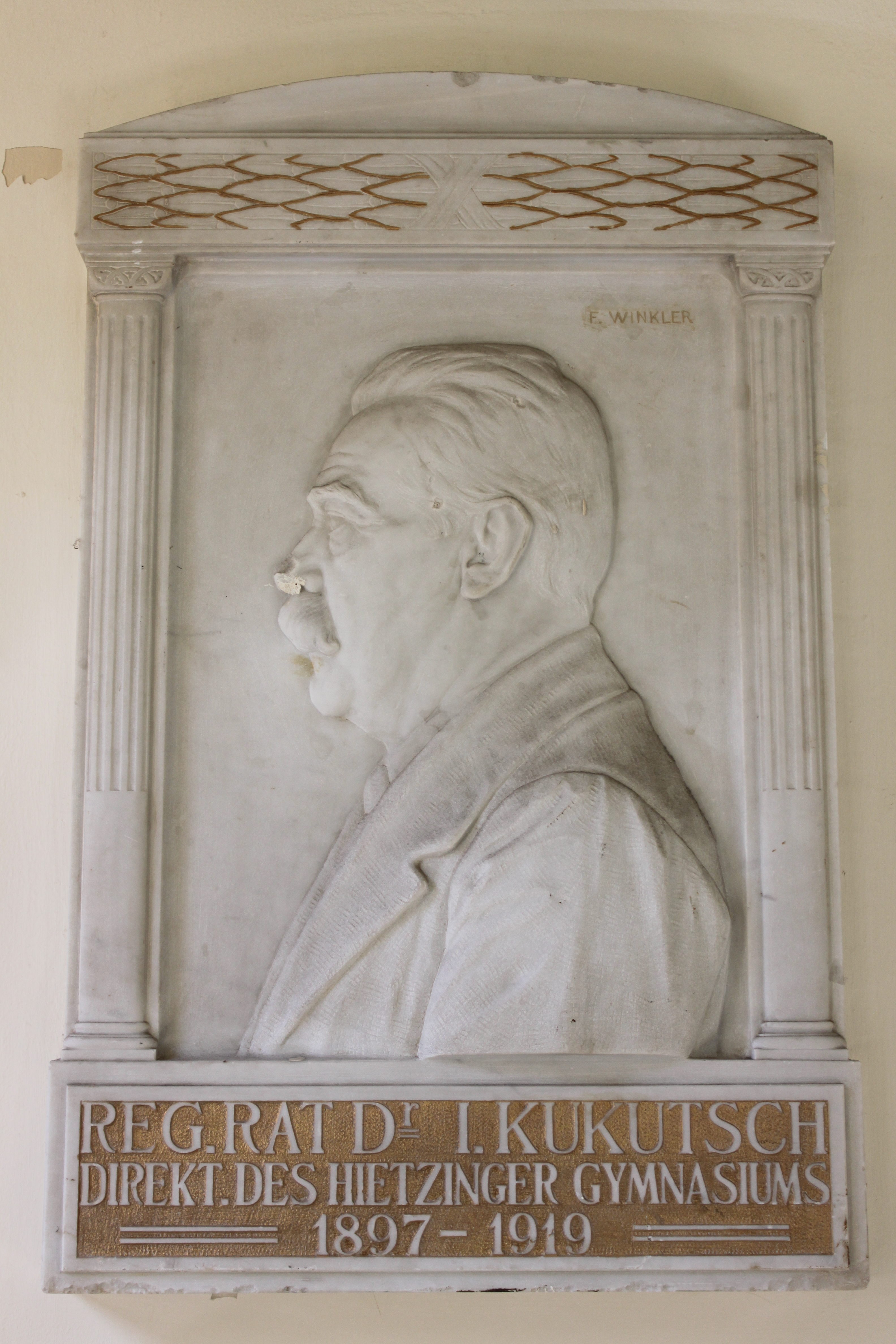 Gymnasium Fichtnergasse, im Stiegenhaus vom EG ins 1.OG, Reliefporträt zum ersten Direktor Reg.Rat Dr. Isidor Kukutsch (1897-1919), mit Signatur F. Winkler